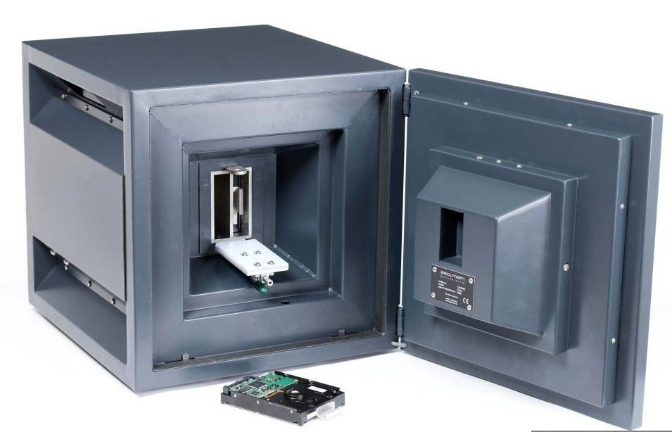 Disaster proof storage